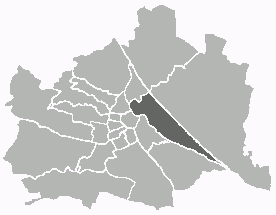 Positionskarte des 2. Wiener Gemeindebezirks Unter Verwendung einer Vorlage von Extrawurst. Public Domain.